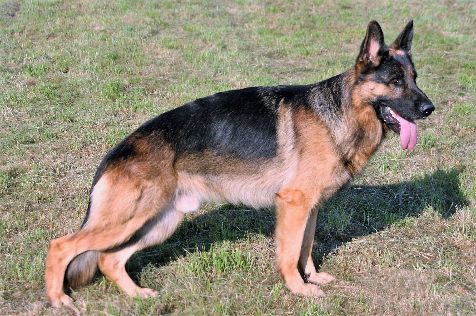 Deutscher Schäferhundrüde mit dem Namen „Presley von Beluga“ aus der Zuchtstätte „von Beluga“